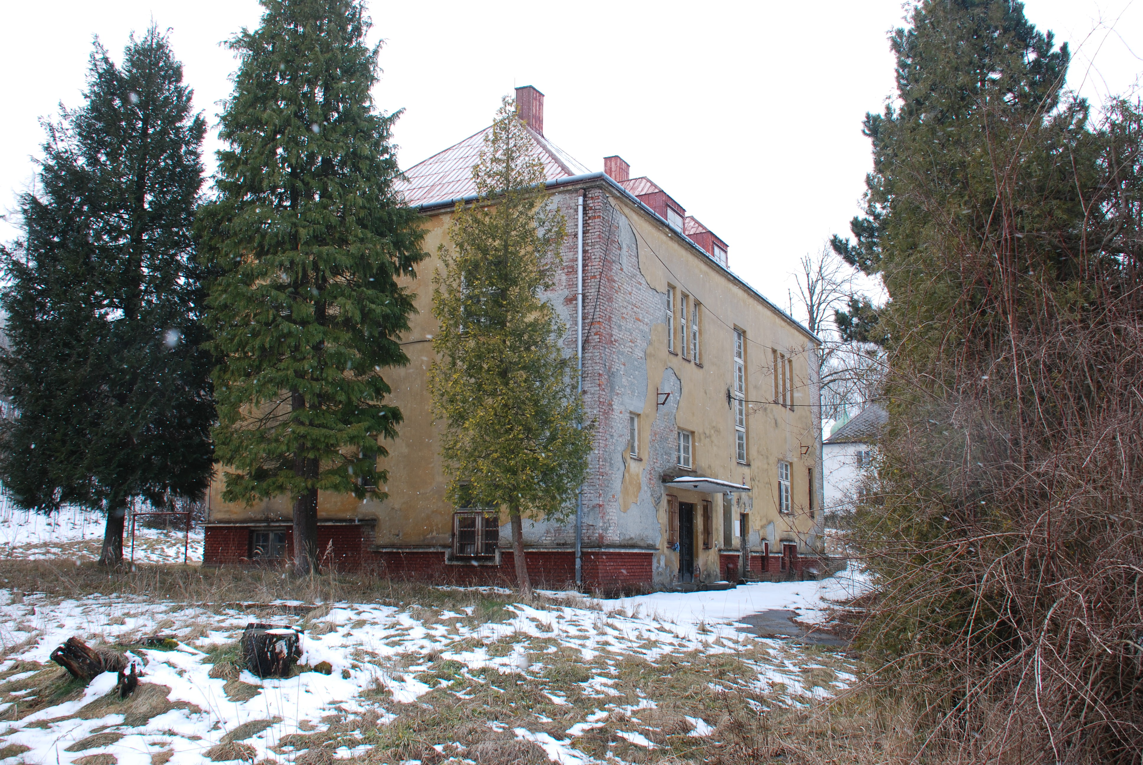 Vila Adolfa Grohmana, Vrbno pod Pradědem.